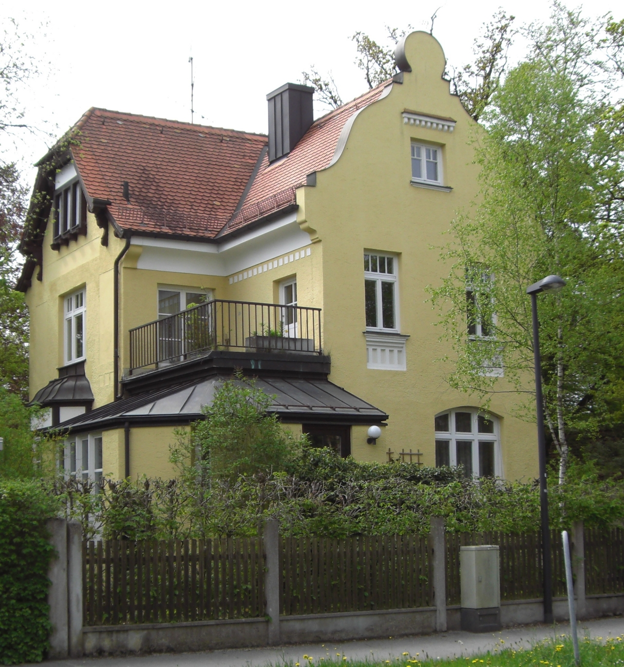 Planegg, evangelisches Pfarrhaus, Karlstr. 3